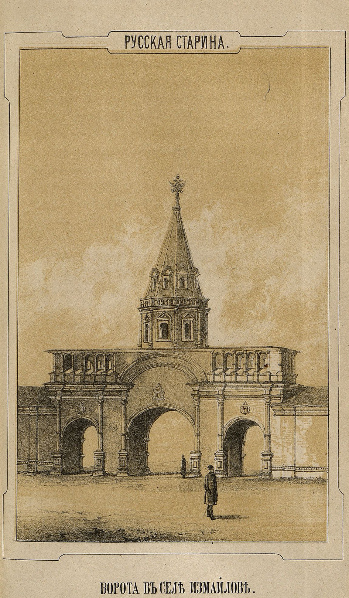 Измайловский дворец. Передние аорота Государева Двора с Надвратной башней.